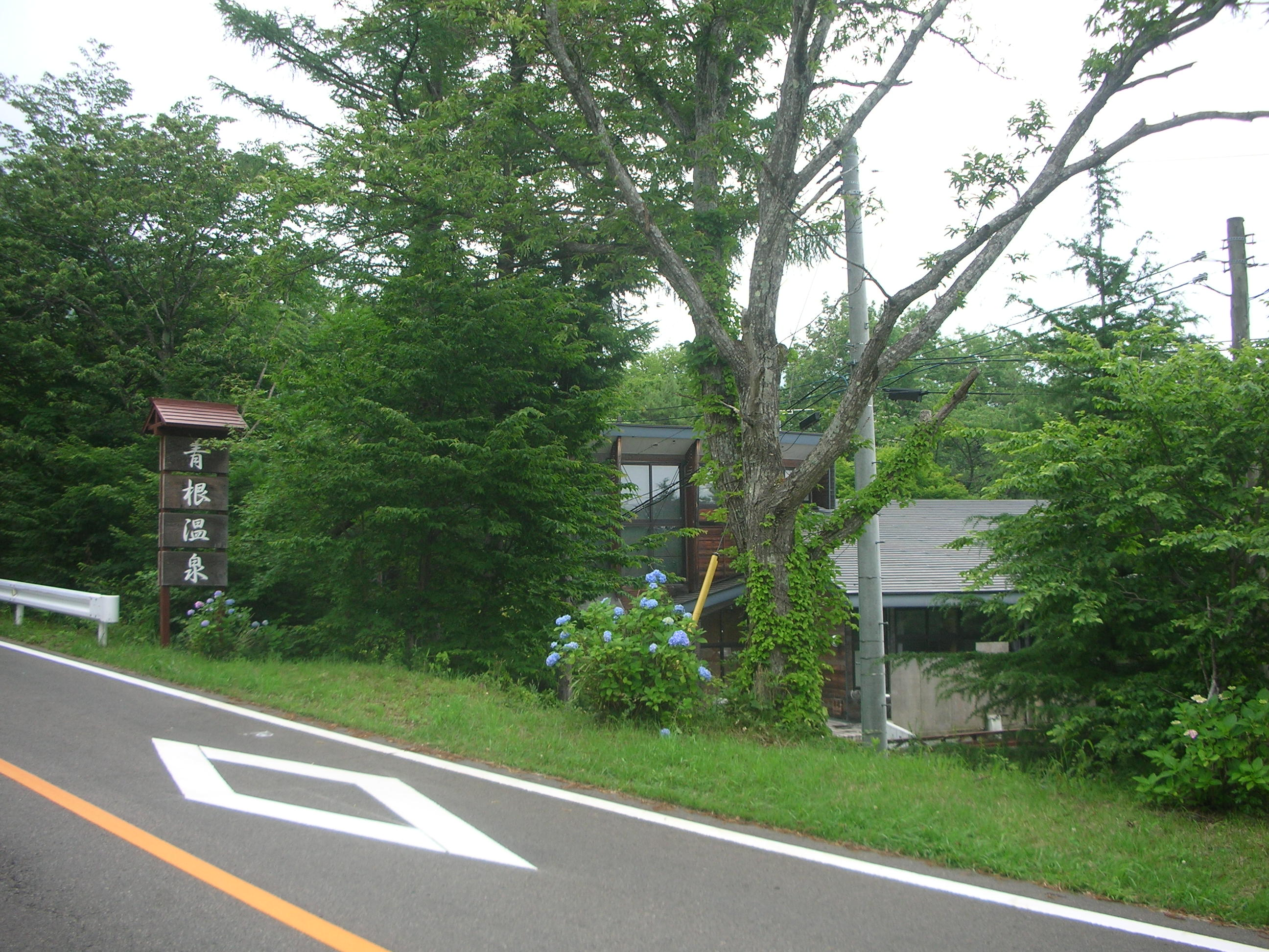 青根温泉郷